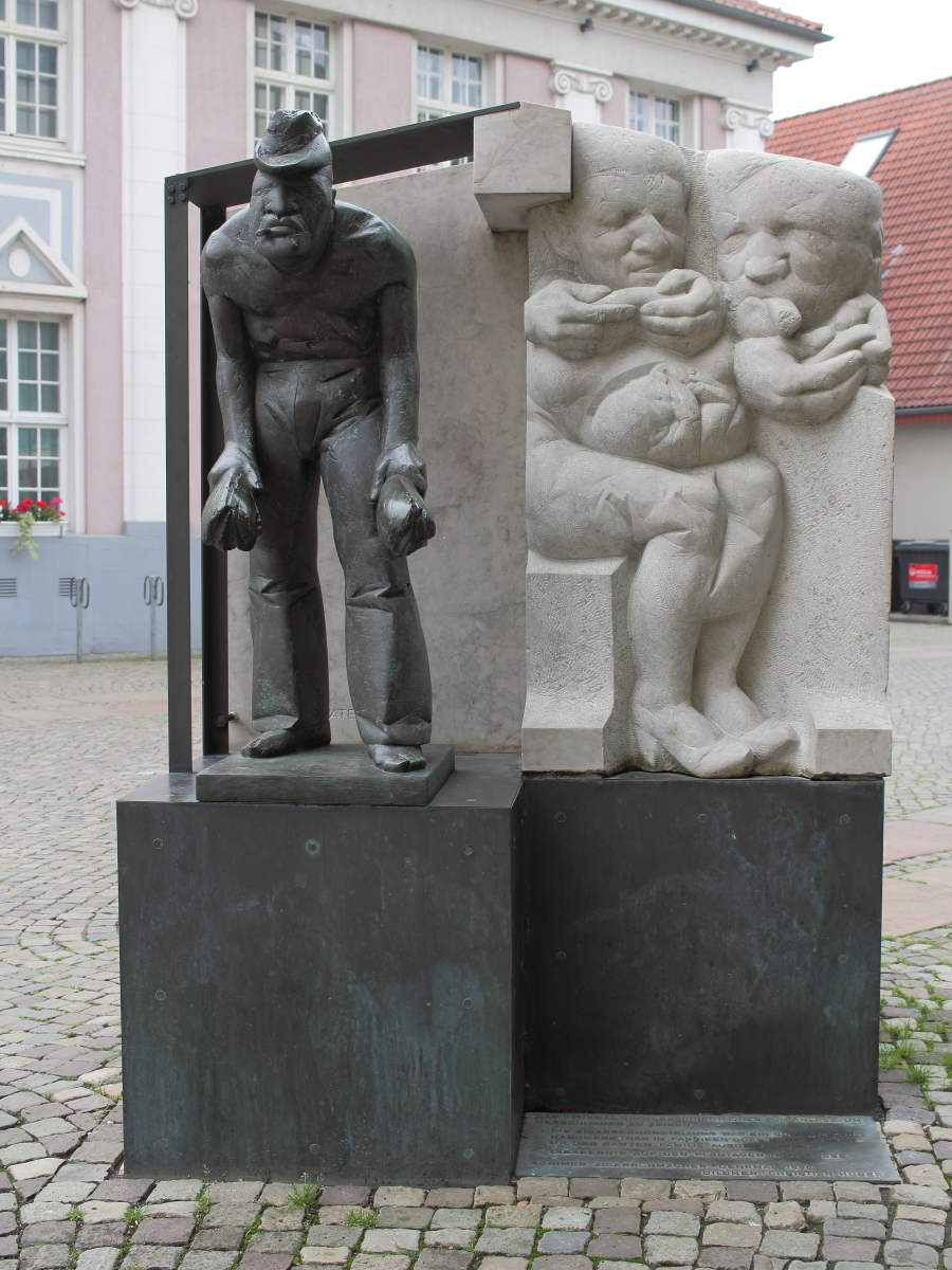 Zigarrenmacherdenkmal vor dem Rathaus in Achim (Landkreis Verden)